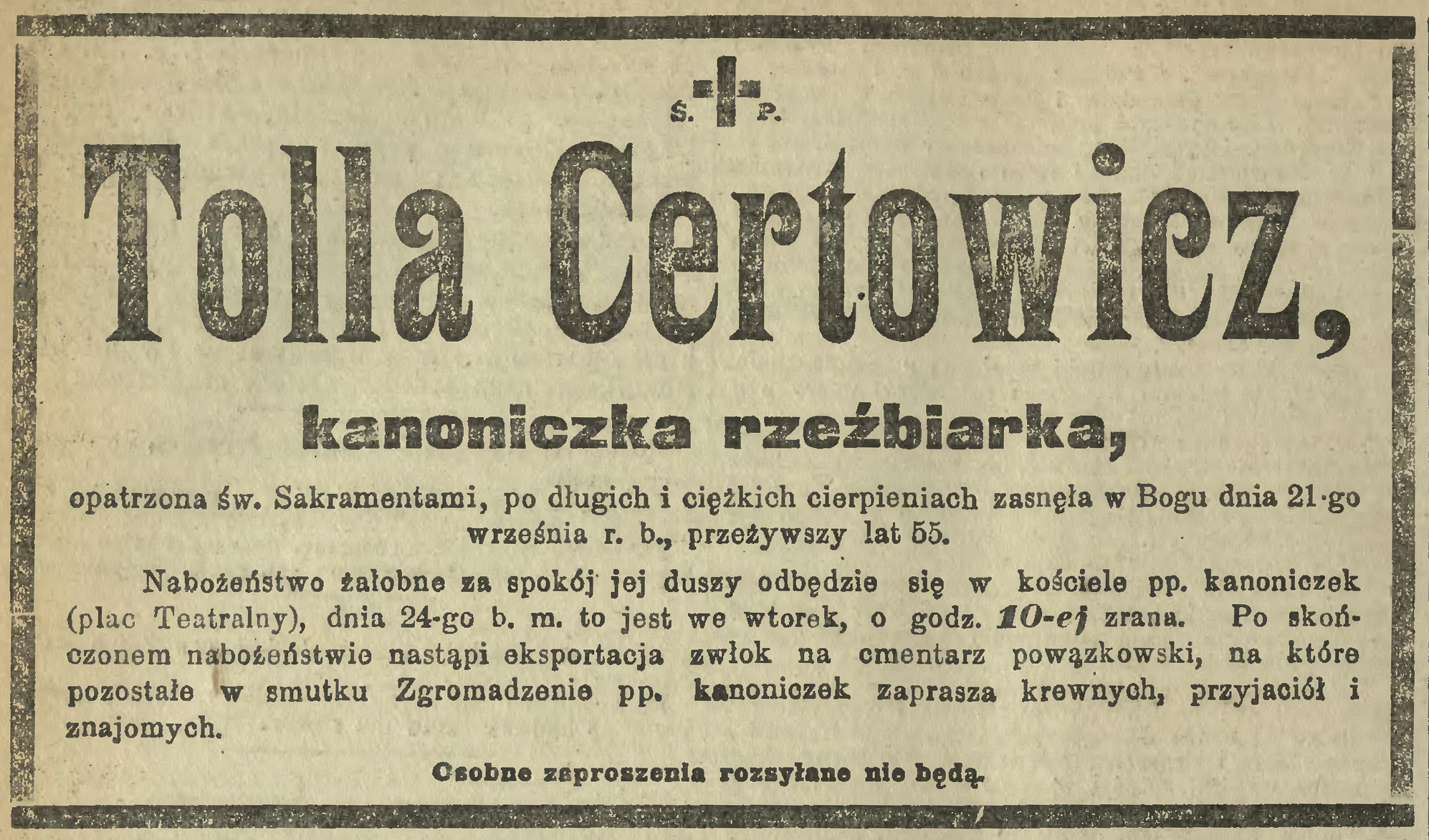 Nekrolog Teofili Certowicz, "Kurier Warszawski" nr 263 z dnia 23 IX 1918 (s. 4).